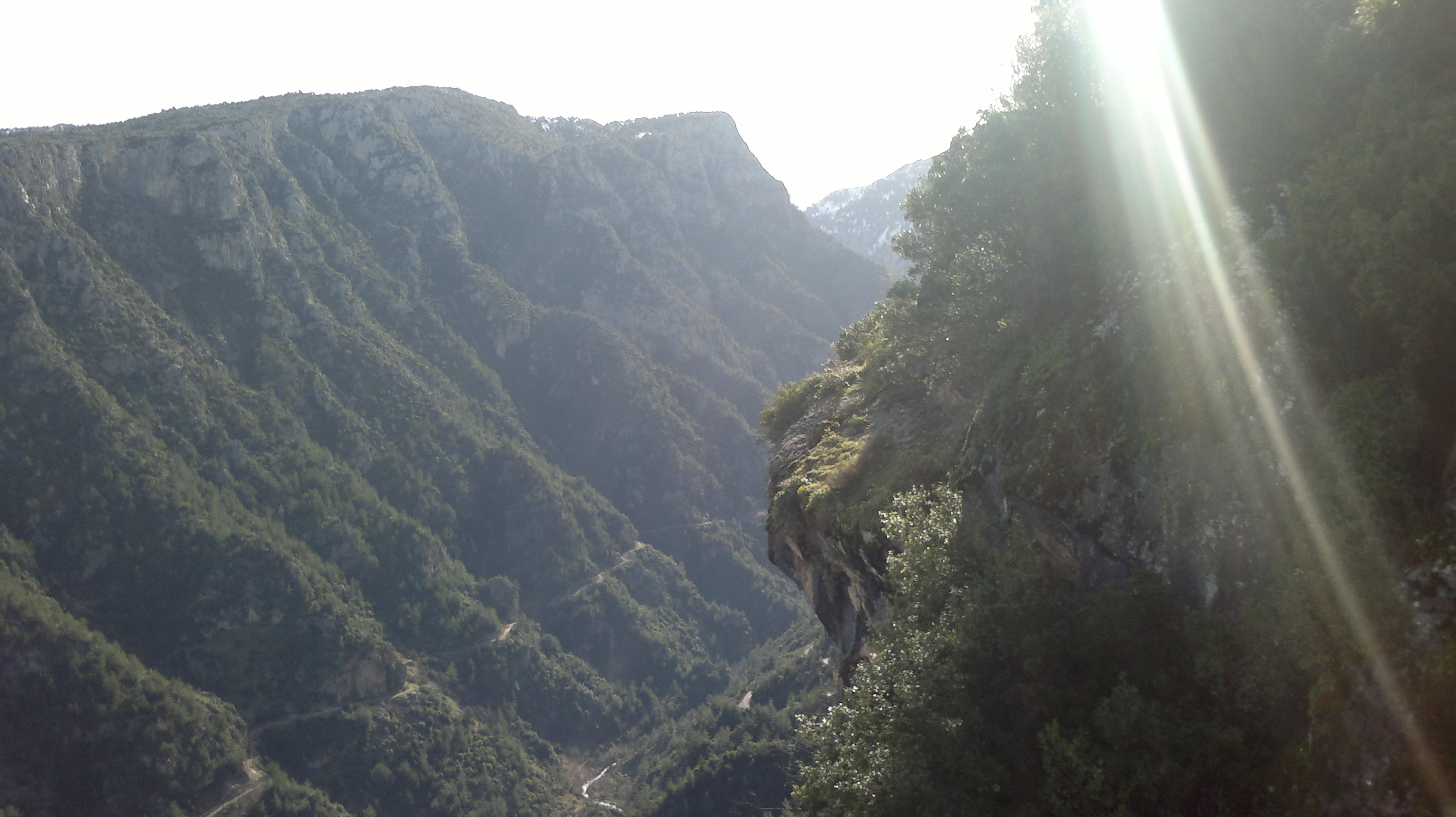 أعمق وادي في لبنان